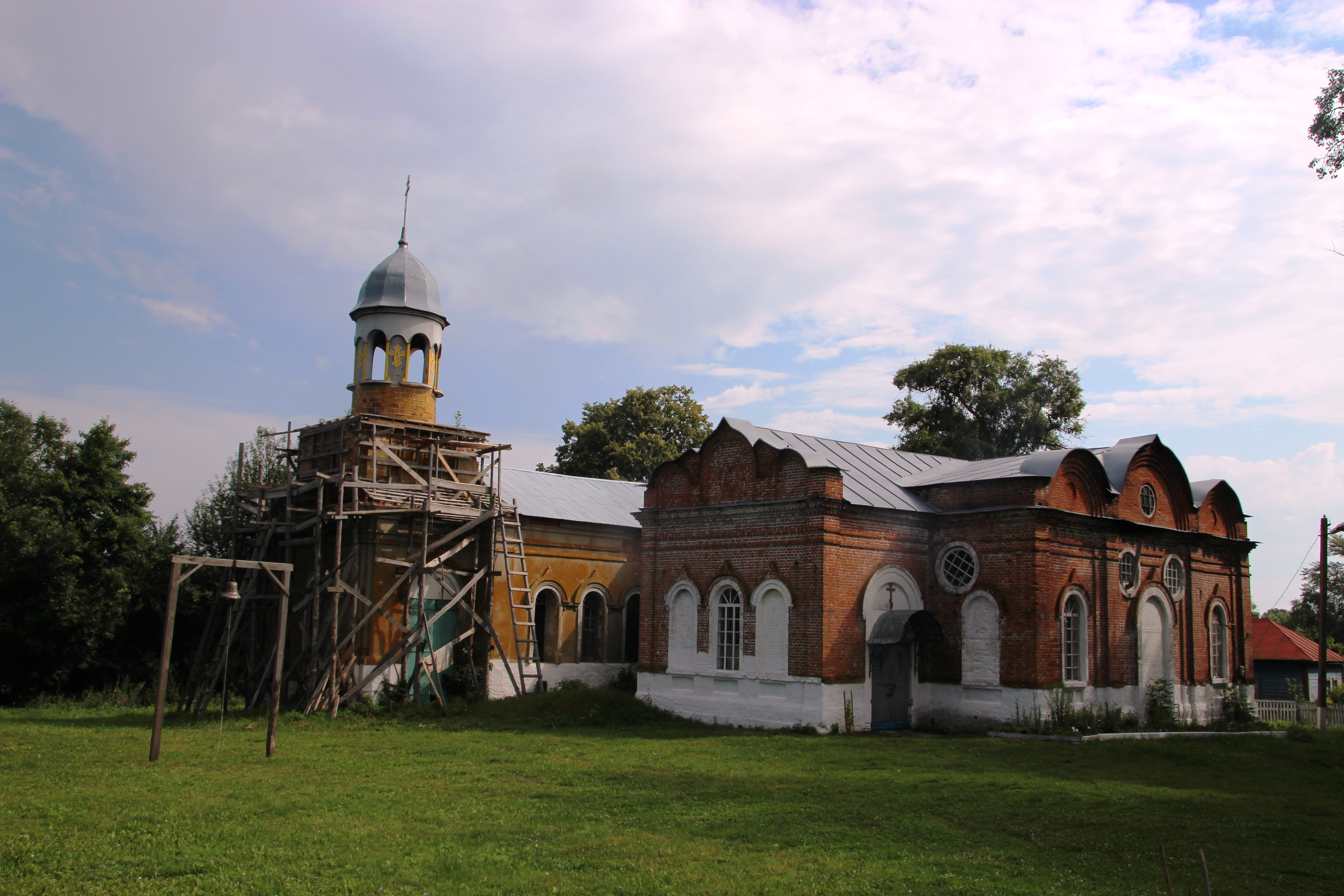 Успенська церква (мур.), село Тулиголове, вул. Жовтневої революції, 20